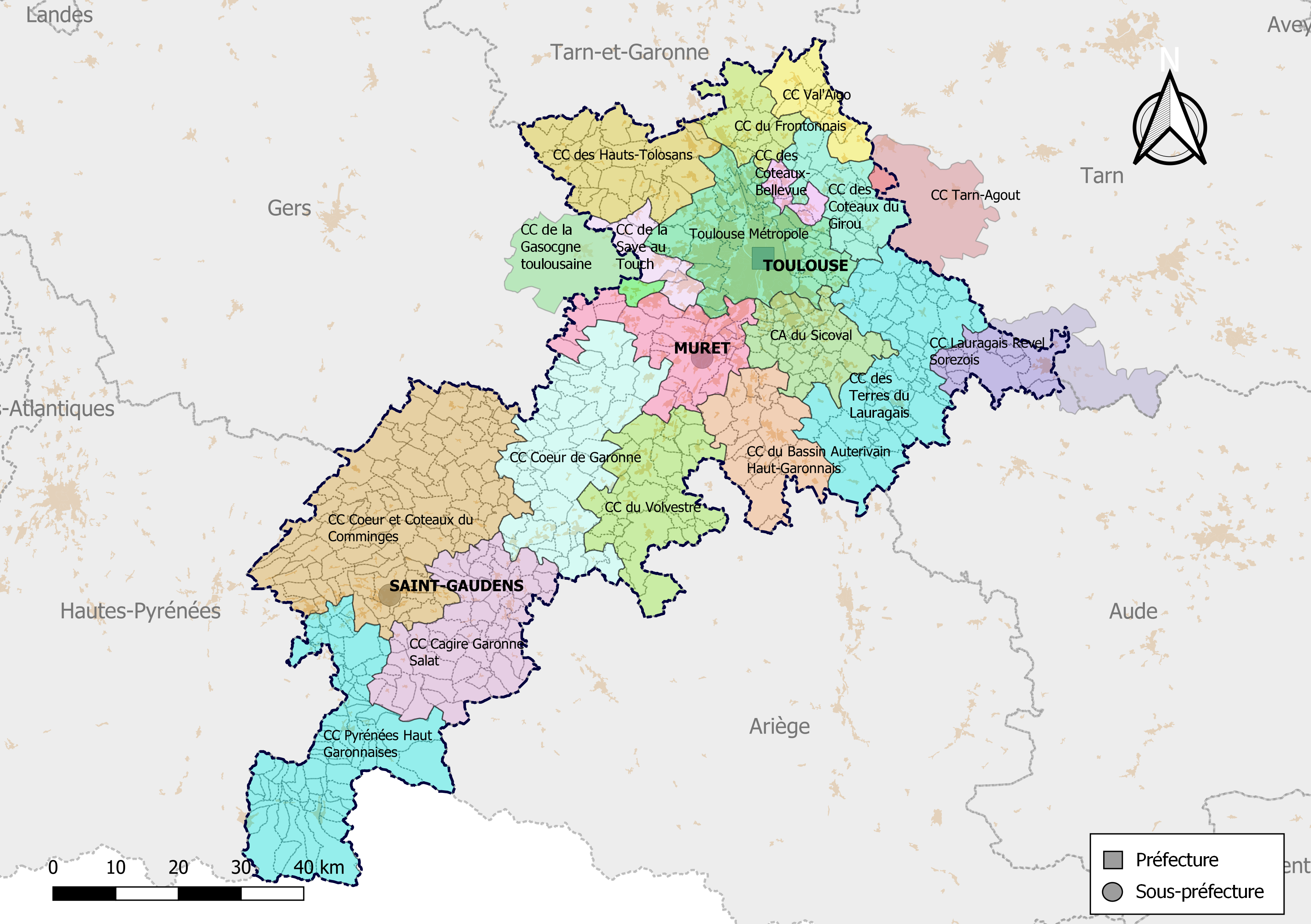 Carte des intercommunalités du département de la Haute-Garonne, France. Composition au 1er janvier 2019.